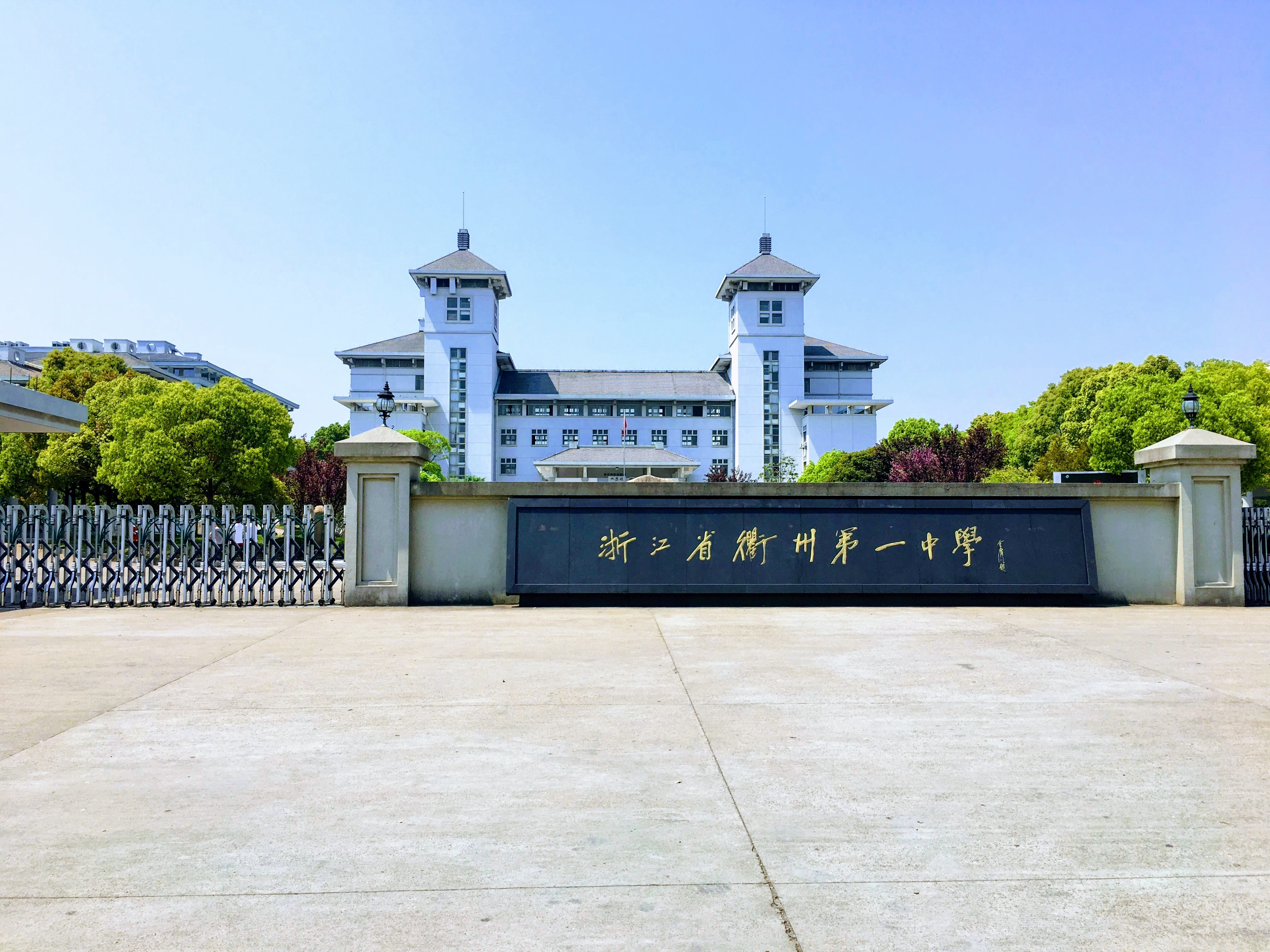 中文（中国大陆）: 衢州一中正门